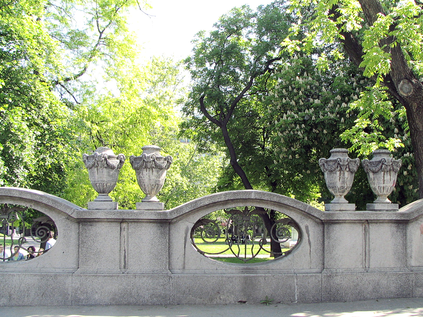 Ограда око Студентског парка архитекте Милутина Борисављевића